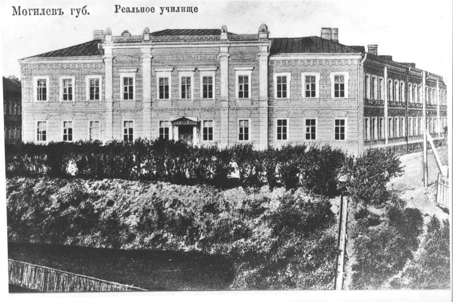 Аляксандраўскае рэальнае вучылішча